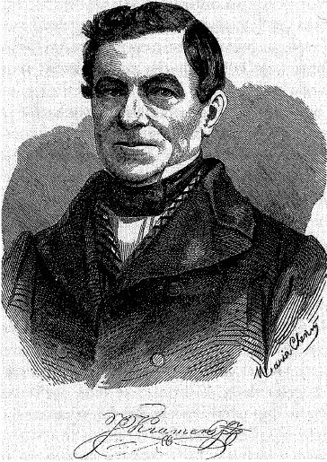 Portret (houtsnede) van lexicograaf Jacob Kramers (1802-1869), door Maria Chenay.